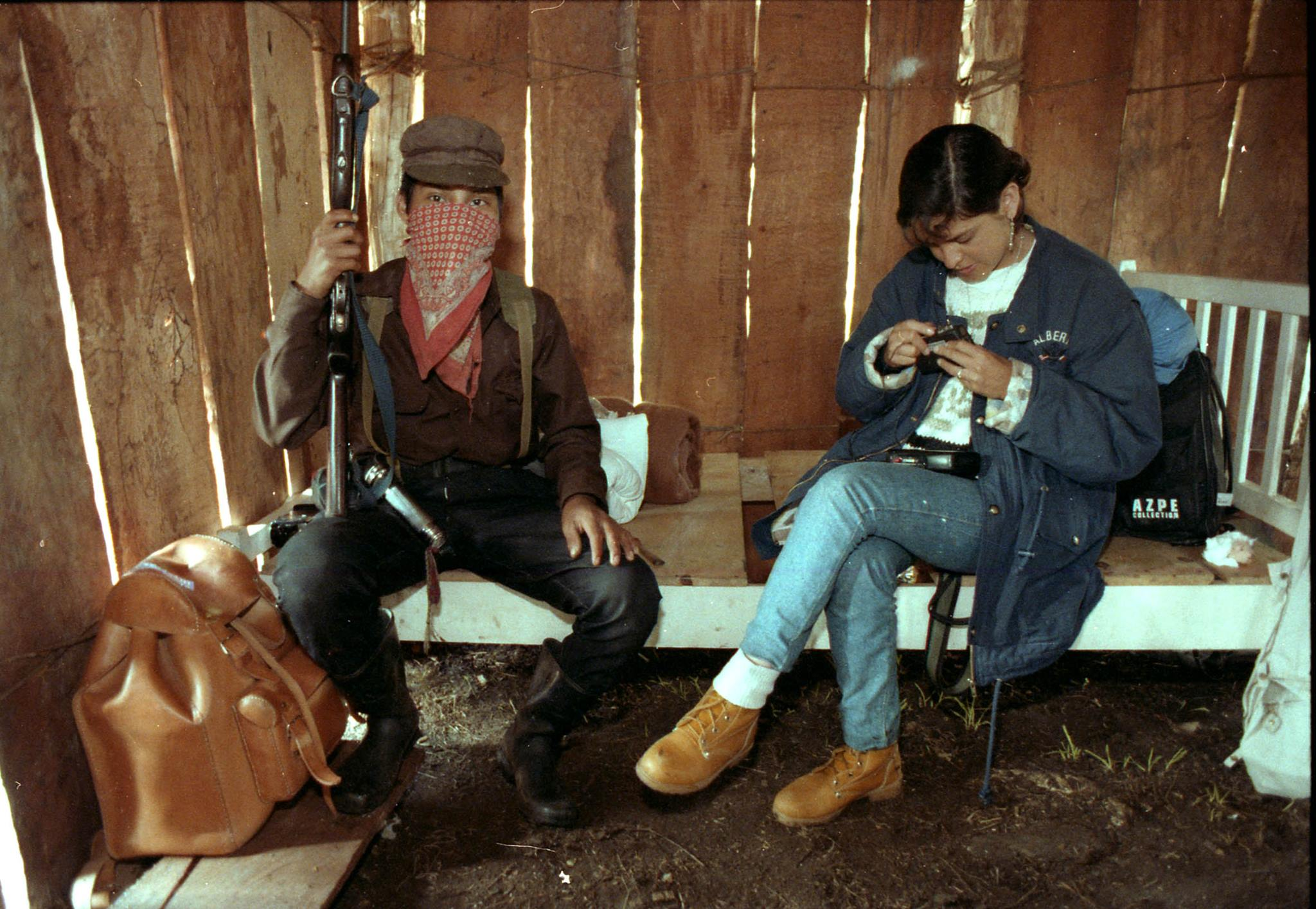 Cobertura levantamiento zapatista 1994